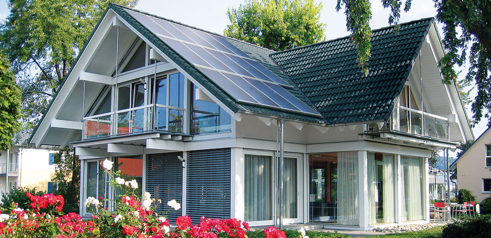 Modernes Fachwerkhaus in Fertighausbauweise